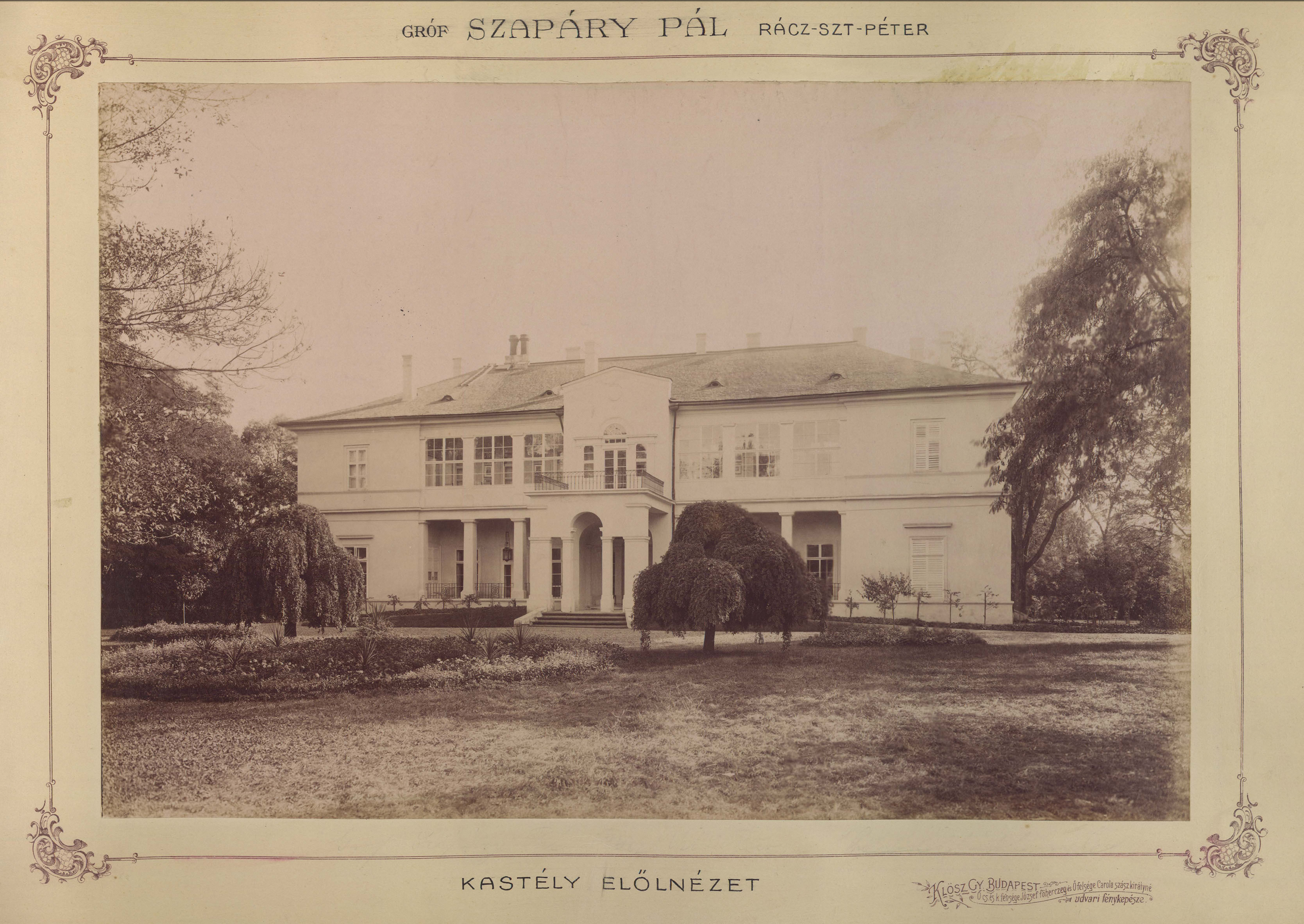 (ekkor Rácz-Szent-Péter), gróf Szapáry Pál kastélyának elölnézete. A felvétel 1895-1899 között készült. A kép forrását kérjük így adja meg: Fortepan / Budapest Főváros Levéltára. Levéltári jelzet: HU.BFL.XV.19.d.1.12.170 Location: Romania, Transylvania, Sânpetru Mare Tags: castle Title: (ekkor Rácz-Szent-Péter), gróf Szapáry Pál kastélyának elölnézete. A felvétel 1895-1899 között készült. A kép forrását kérjük így adja meg: Fortepan / Budapest Főváros Levéltára. Levéltári jelzet: HU.BFL.XV.19.d.1.12.170